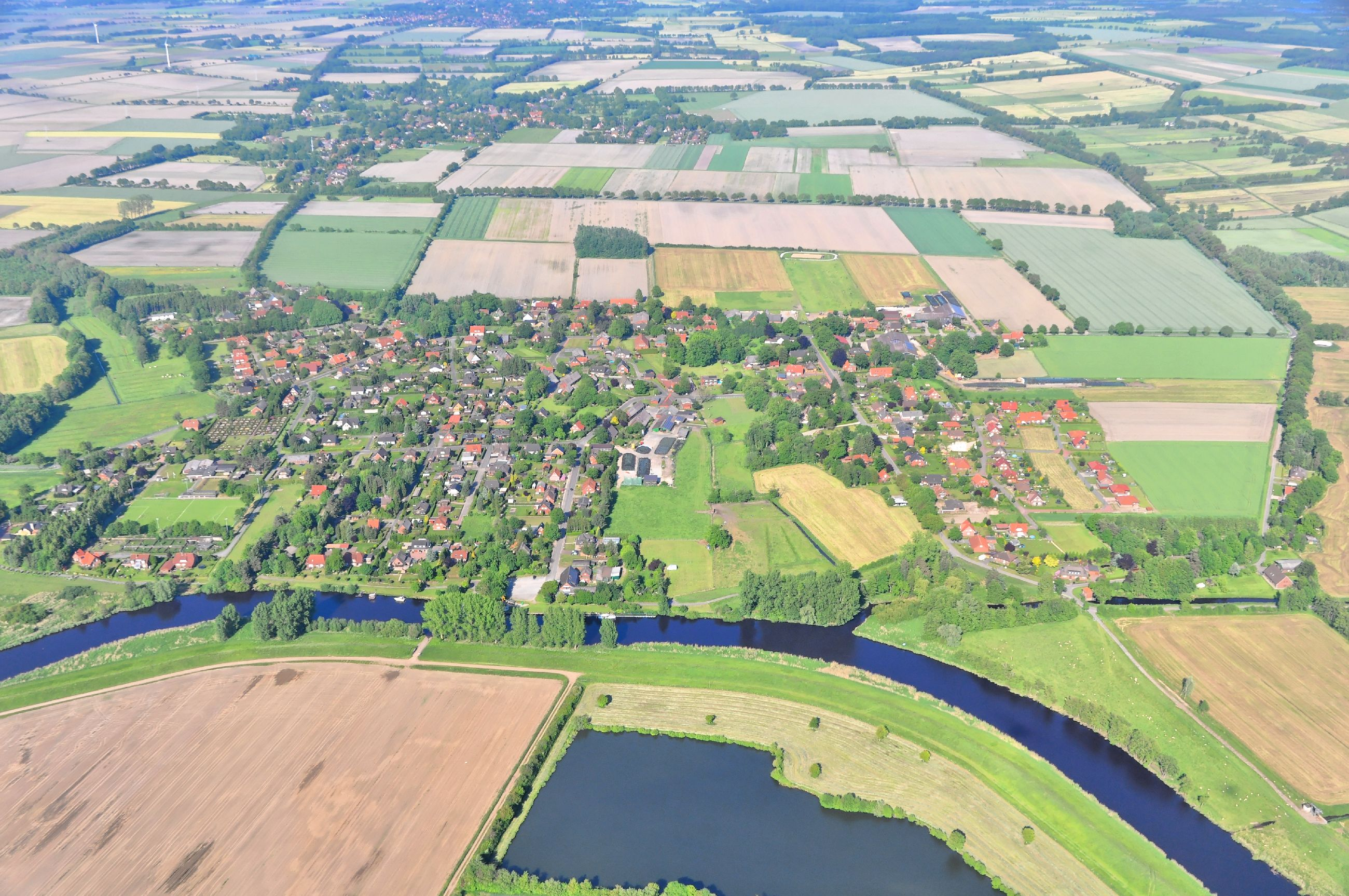 Überführungsflug vom Flugplatz Nordholz-Spieka über Lüneburg, Potsdam zum Flugplatz Schwarzheide-Schipkau